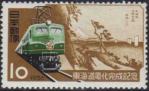 日本国有鉄道東海道本線の電化完成を記念する切手。描かれているのはEF58型電気機関車の安藤広重画「由井」である。